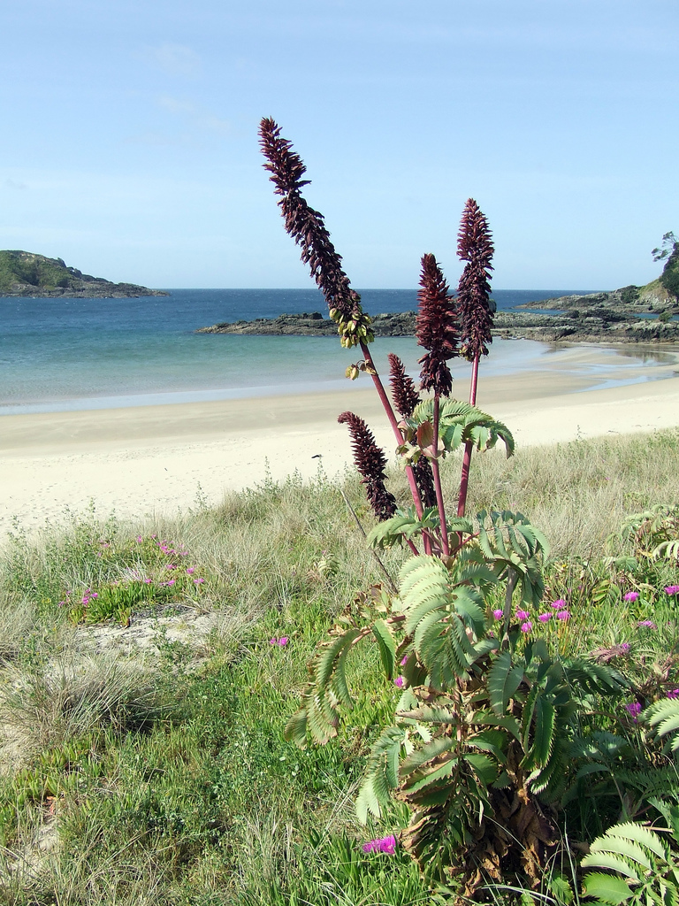 Matai Bay, Karikari Peninsula, Northland, New Zealand